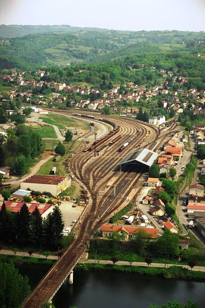 Rangéiergare Capdenac